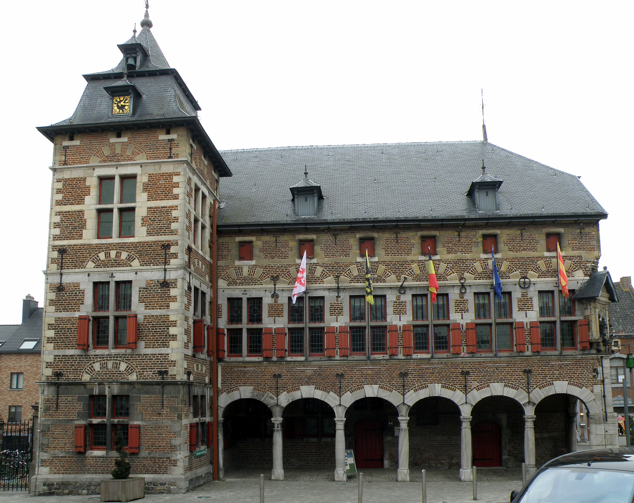 Looz (en néerl. Borgloon), prov. de Limbourg, Belgique. Hôtel de ville.